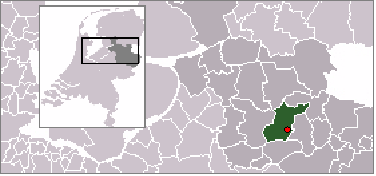 Locatie van Nijverdal, zelf gemaakte kaart op basis van nl::Afbeelding:LocatieHellendoorn.png van Gebruiker:Mtcv.